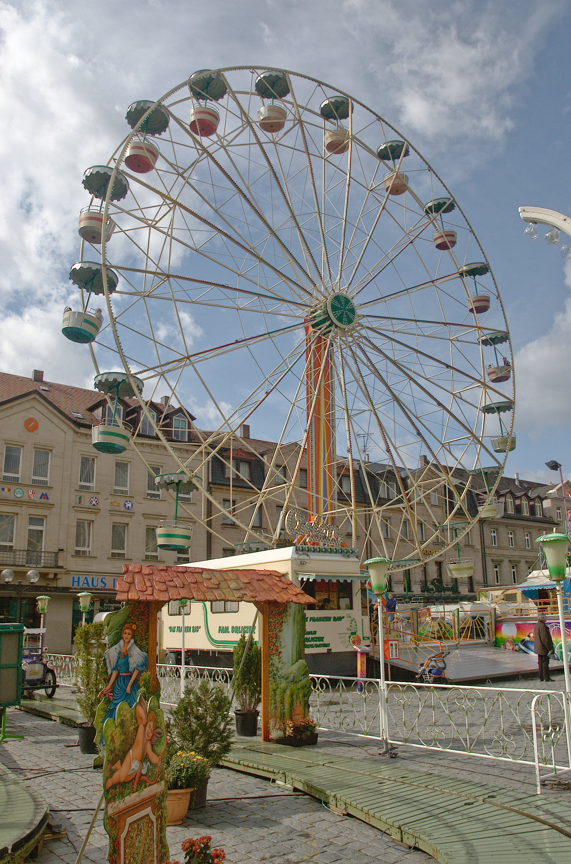 Riesenrad auf der Fürther Kirchweih 2007